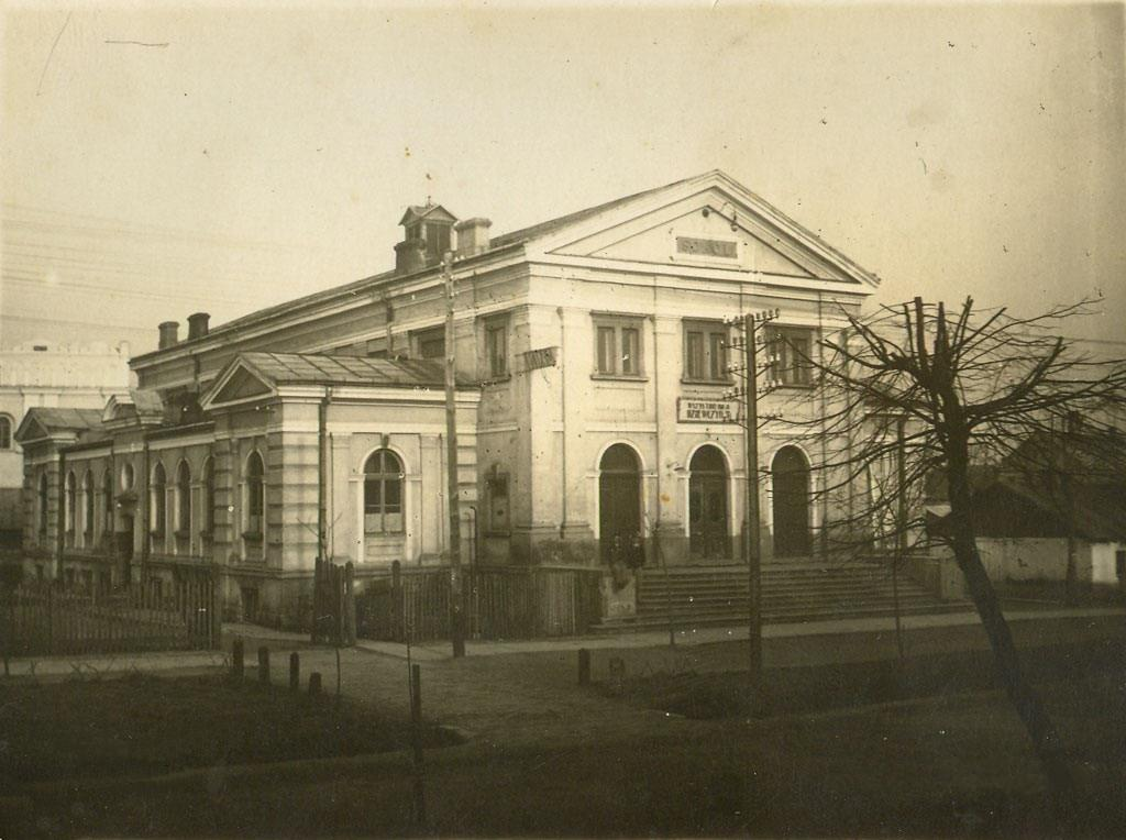 Будівля "Сокола" (тепер Народний дім) в Сокалі, за ним видна Велика синагога.